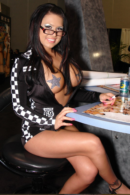 Eva Angelina